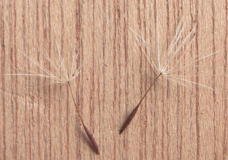 Paardebloemstreepzaad zaad (Crepis vesicaria subsp. taraxacifolia).